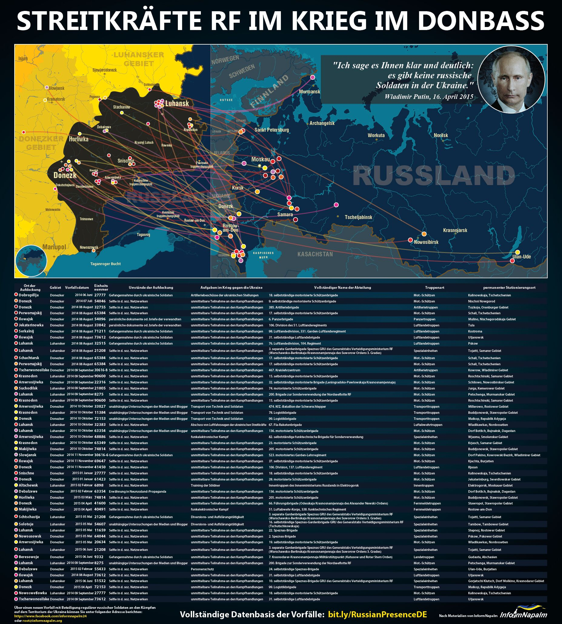 Streitkrafte RF im Krieg im Donbass